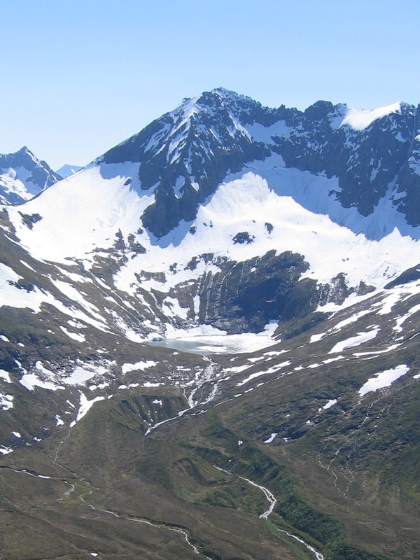 Åvasstinden,Ørsta,Møre og Romsdal